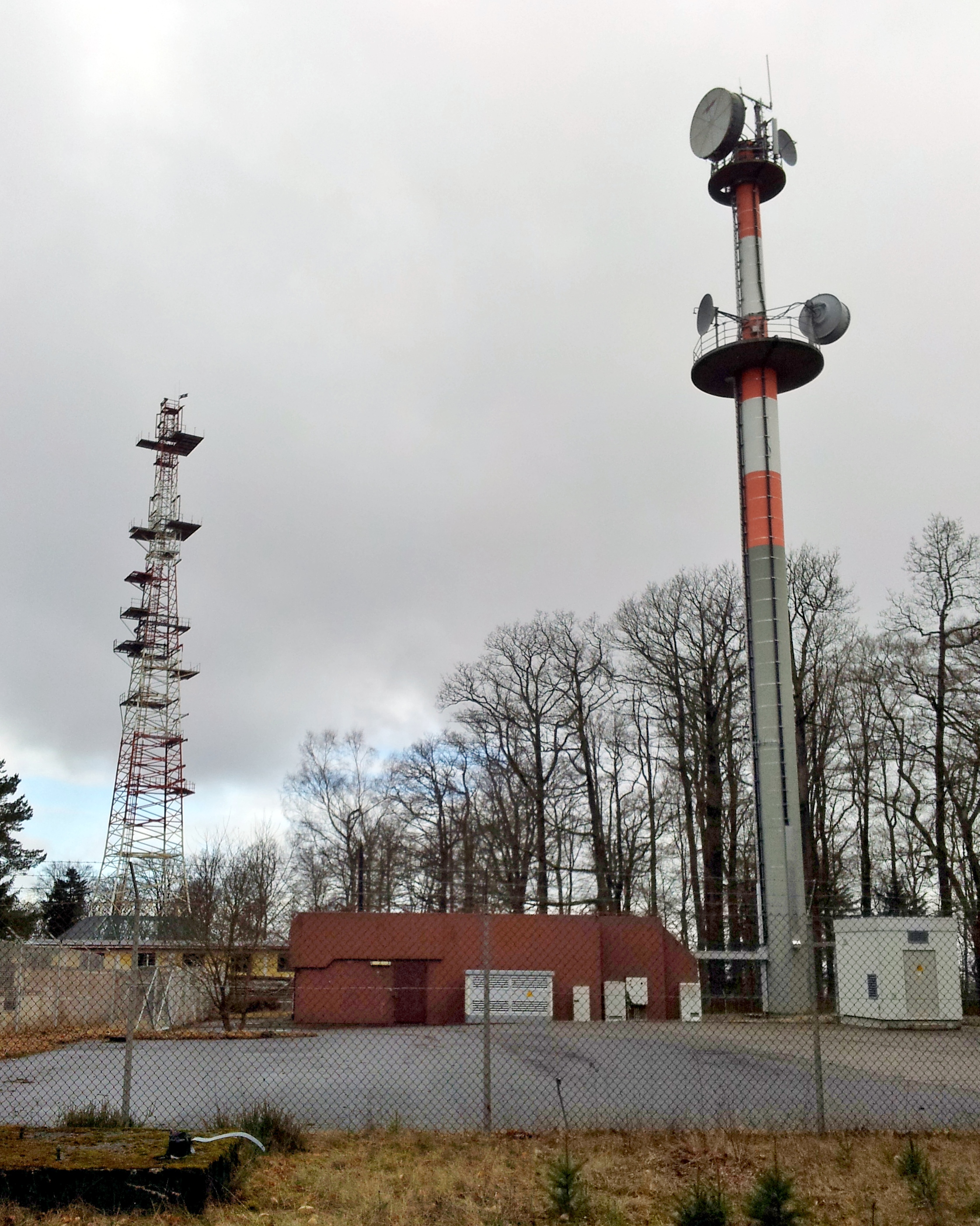 Radio_Relay_Station_Langerkopf